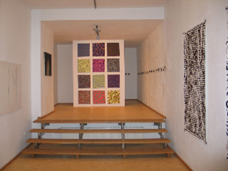 Juergen Kehlig in der Galerie am Klostersee